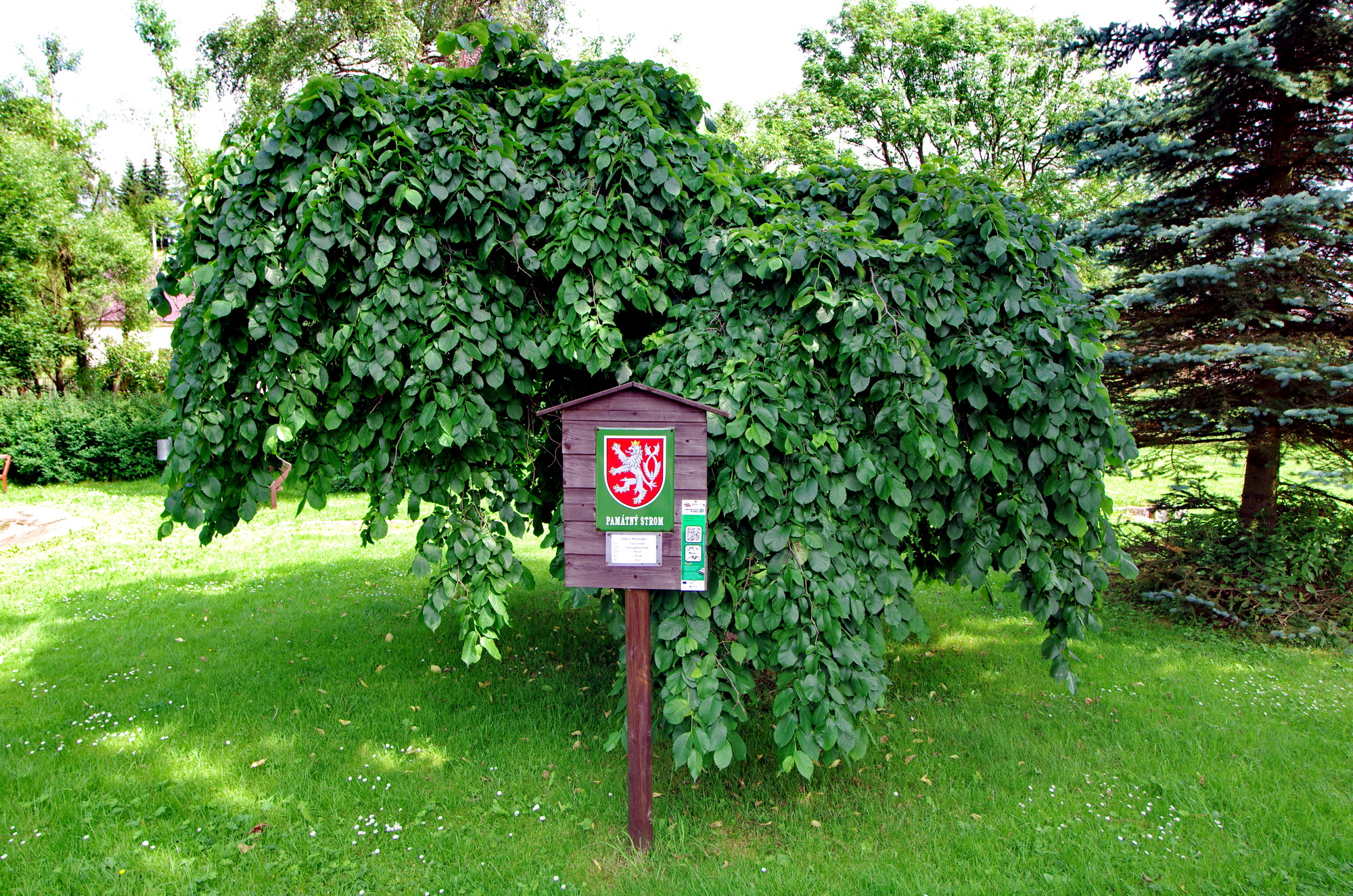 Památný strom Jilm v Perninku, okres Karlovy Vary